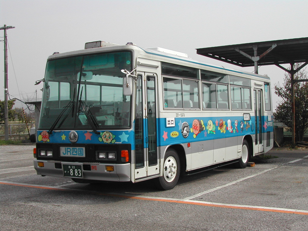 アンパンマン号（初期の車両）